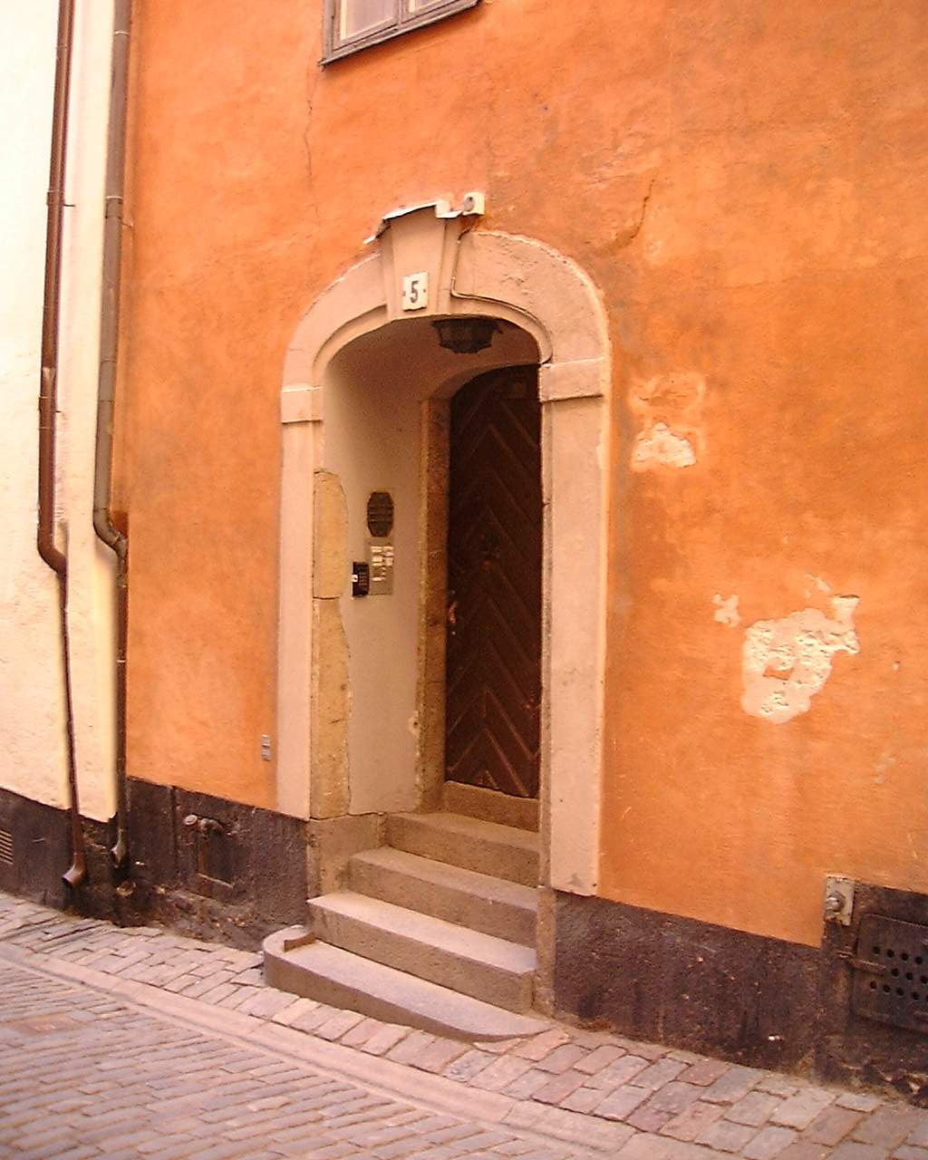 5, Telegrafgränd (Bootes 2), Gamla stan, Stockholm.